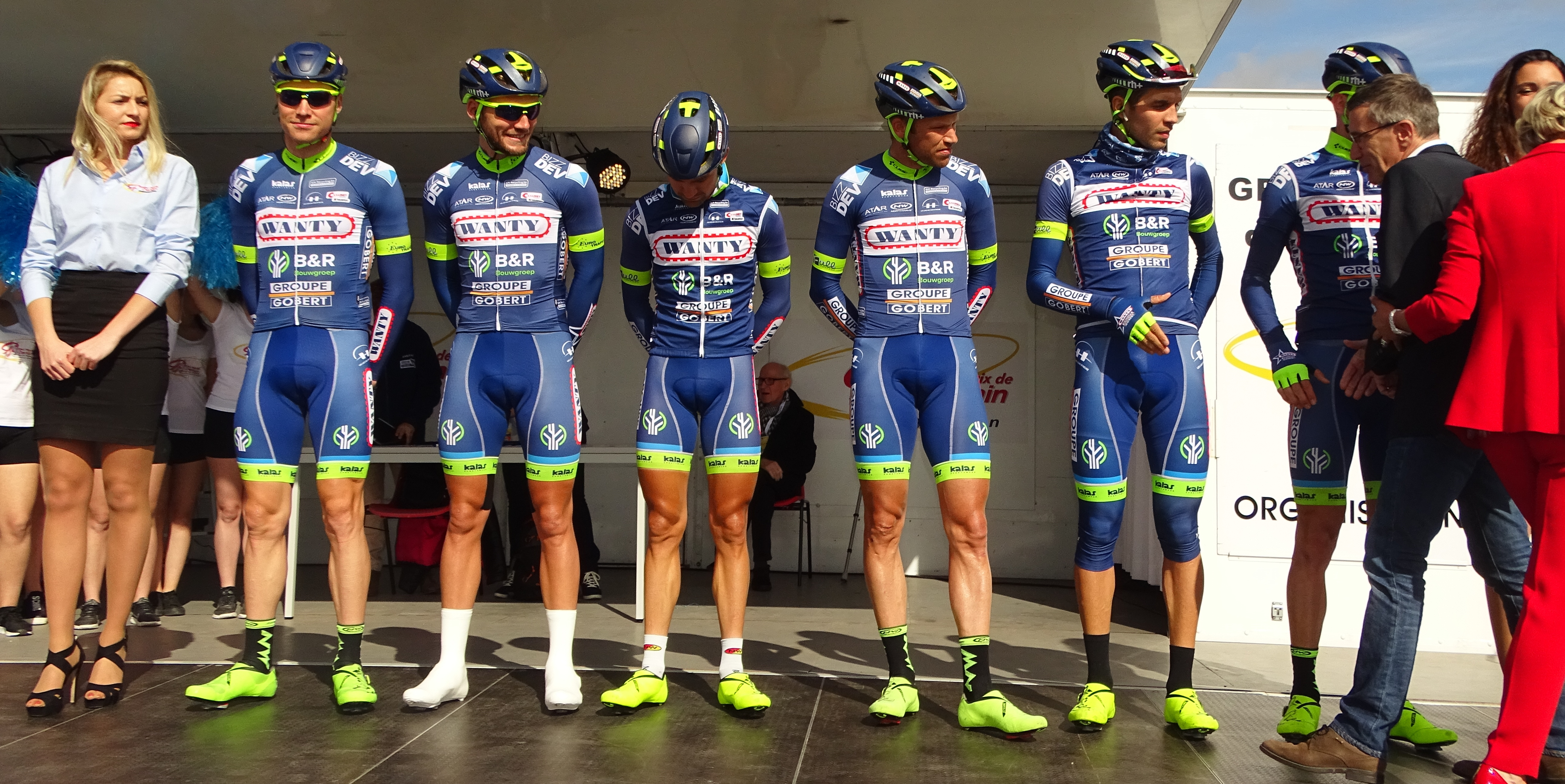 Reportage réalisé le jeudi 13 avril à l'occasion du départ et de l'arrivée du Grand Prix de Denain 2017 à Denain, Nord, Nord-Pas-de-Calais-Picardie, France.